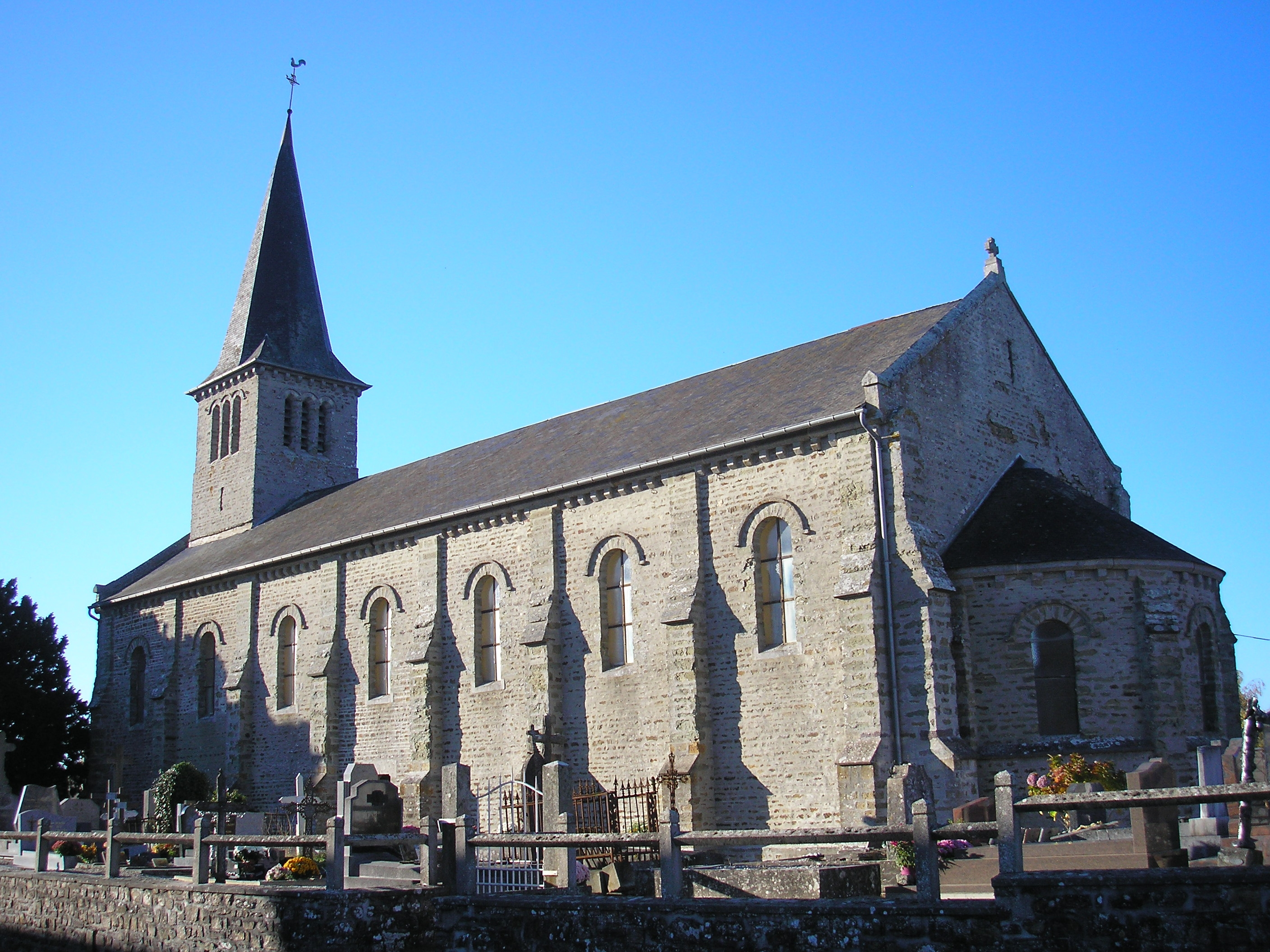 Cauville (Normandie, France). L'église Notre-Dame-de-l'Annonciation.